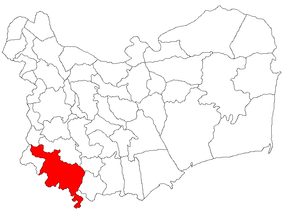 Categorie:Hărţi ale judeţului Tulcea